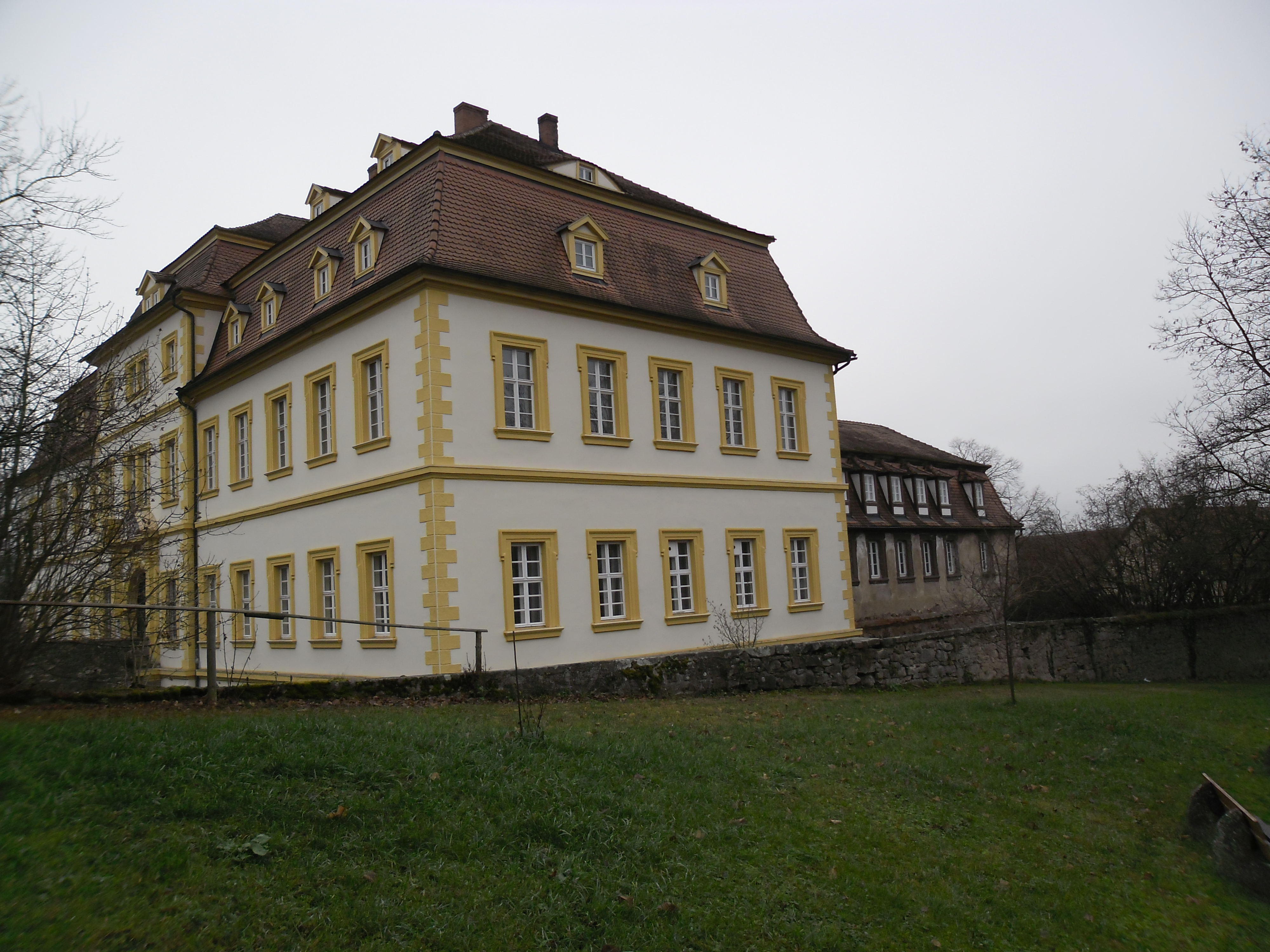 Bilder aus der Gemeinde Trautskirchen, unter anderem mit der Pfarrkirche St. Laurentius und dem Schloss, entstanden überwiegend in der Hauptstraße und in der Schlossstraße im Gemeindegebiet links der Zenn